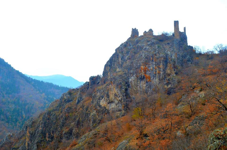 წრიოხის ციხე ეკლესიით